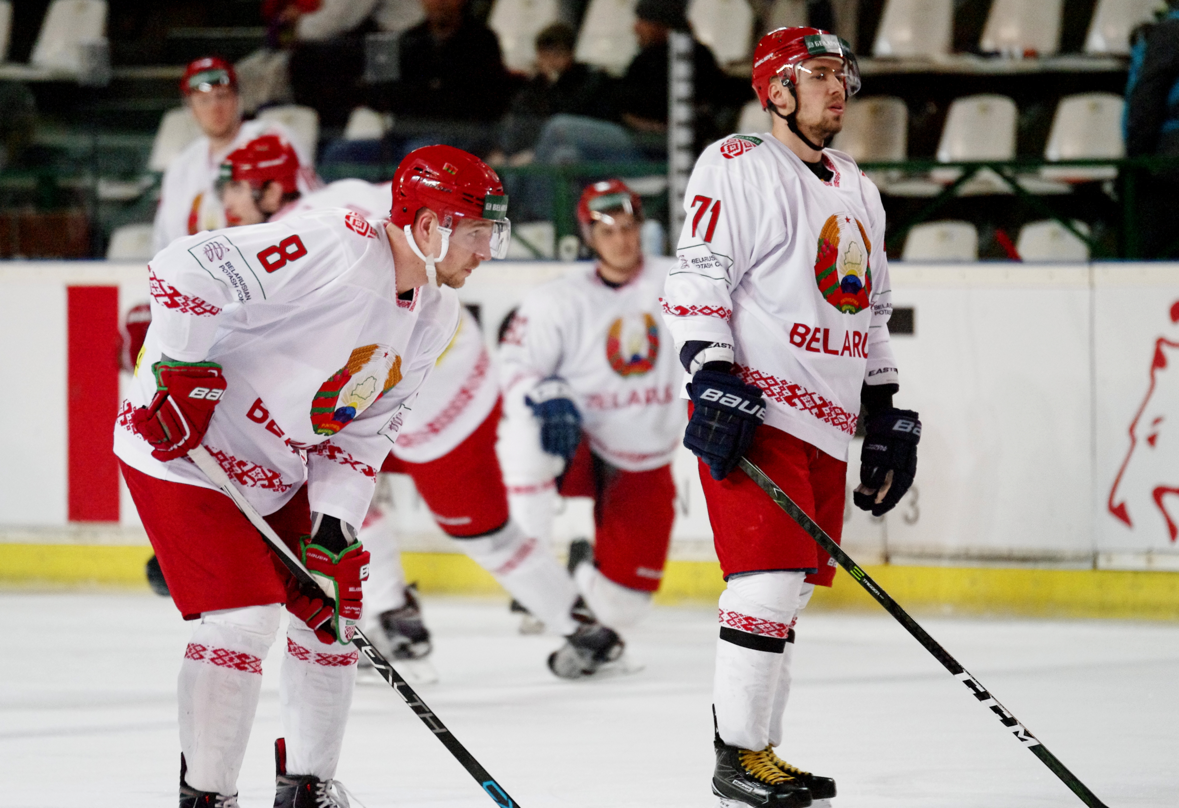 France vs. Biélorussie, 1er mai 2017; #71 Alexander Pavlovich, #8 Ilia Shinkevich